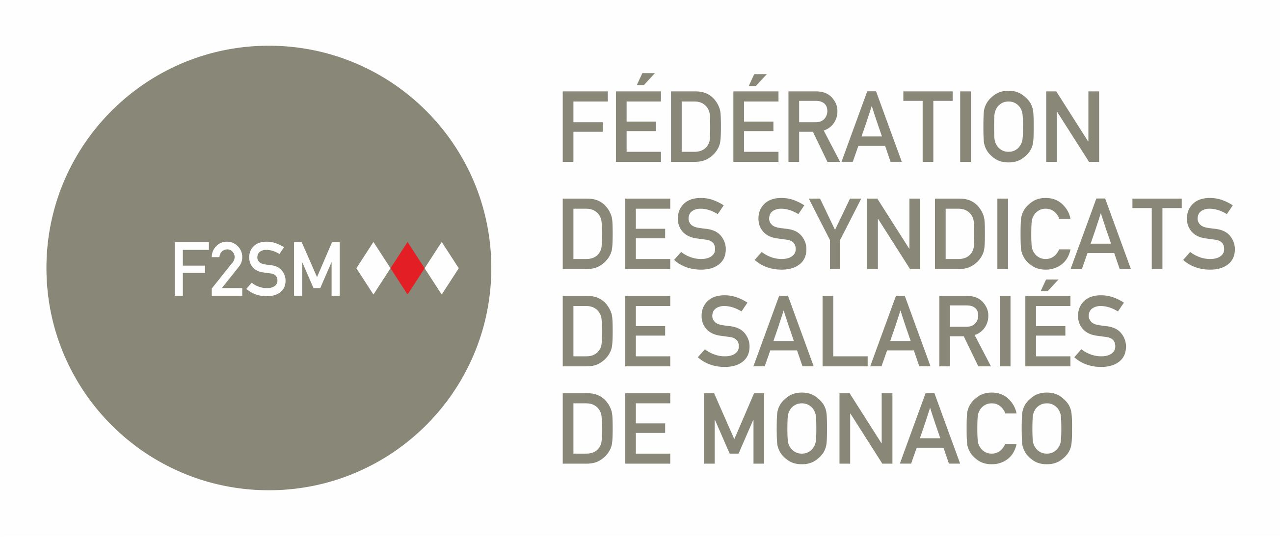 Logo de la fédération